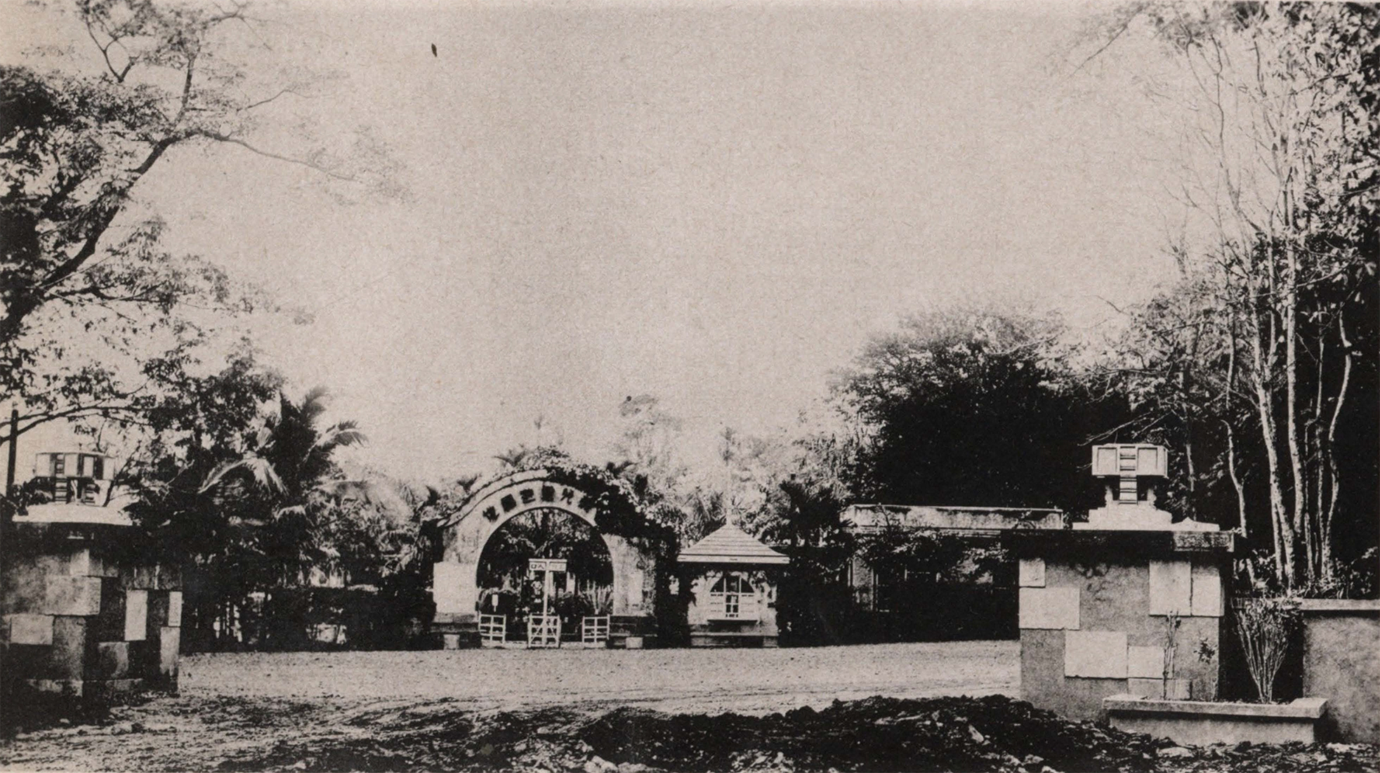 中文（台灣）: 1934年設立的嘉義兒童遊園地，位於嘉義公園西側